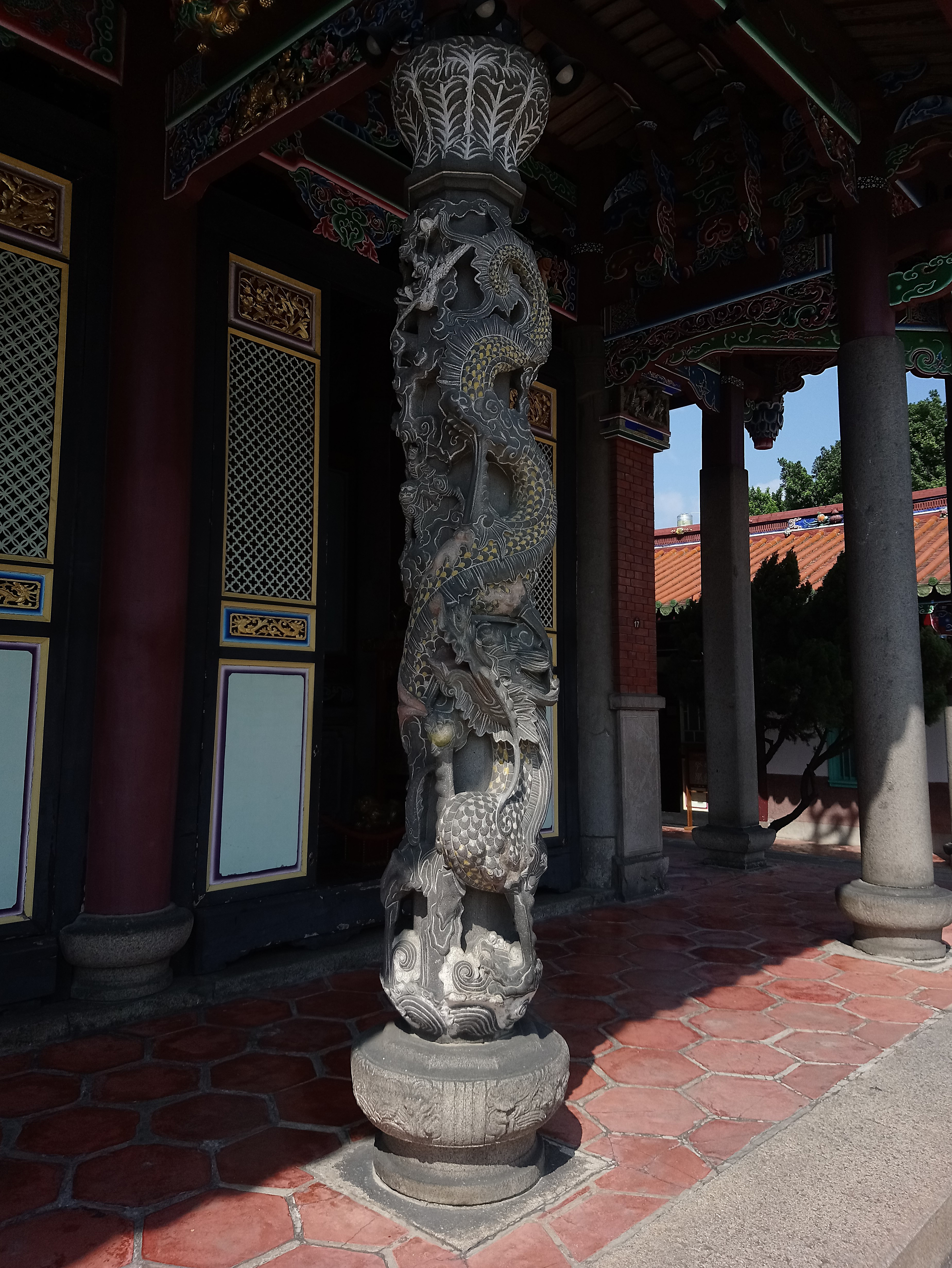 臺北孔子廟大成殿龍柱,臺北市大同區大龍次分區保安里